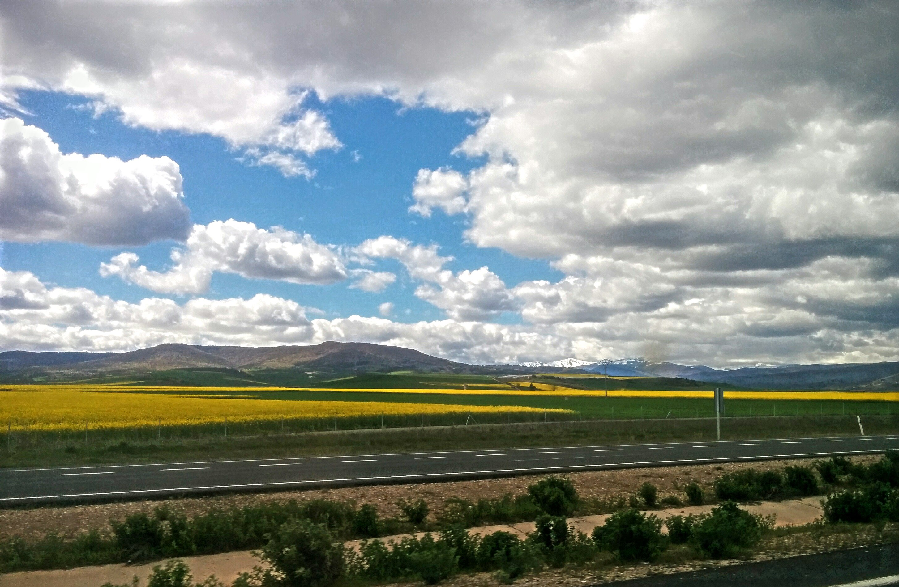 Suma de la imagen filtrada más la imagen original